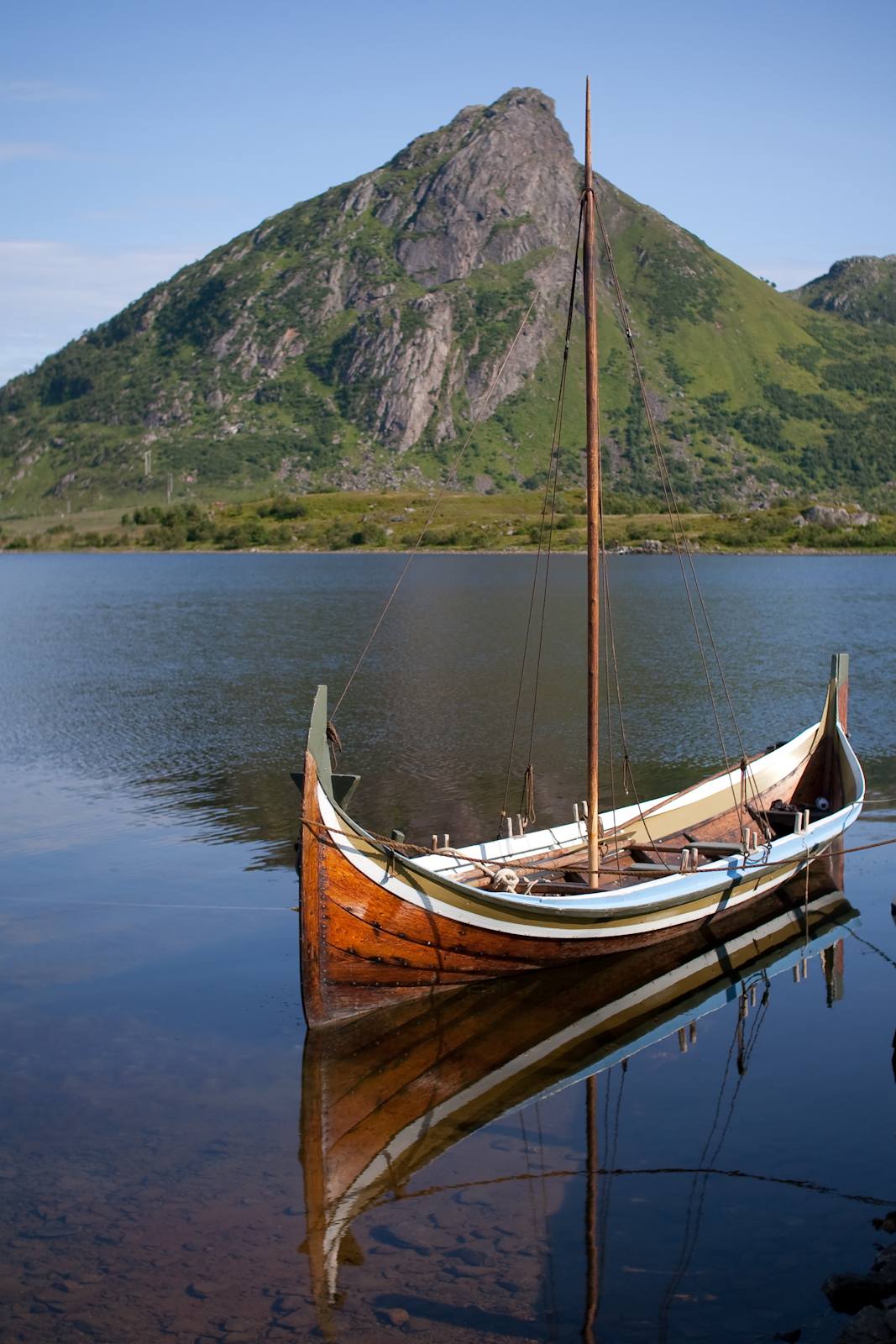 Nordlandsbåt